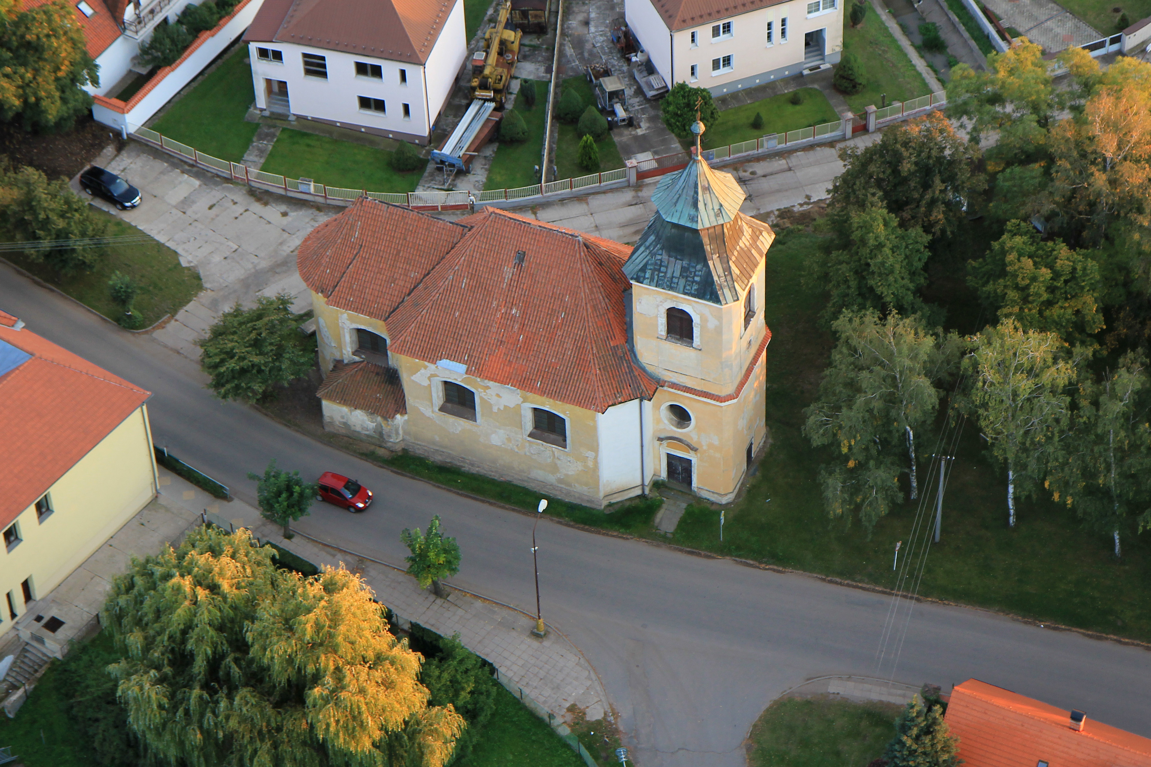 Kostel sv. Maří Magdalény (Semice), Semice